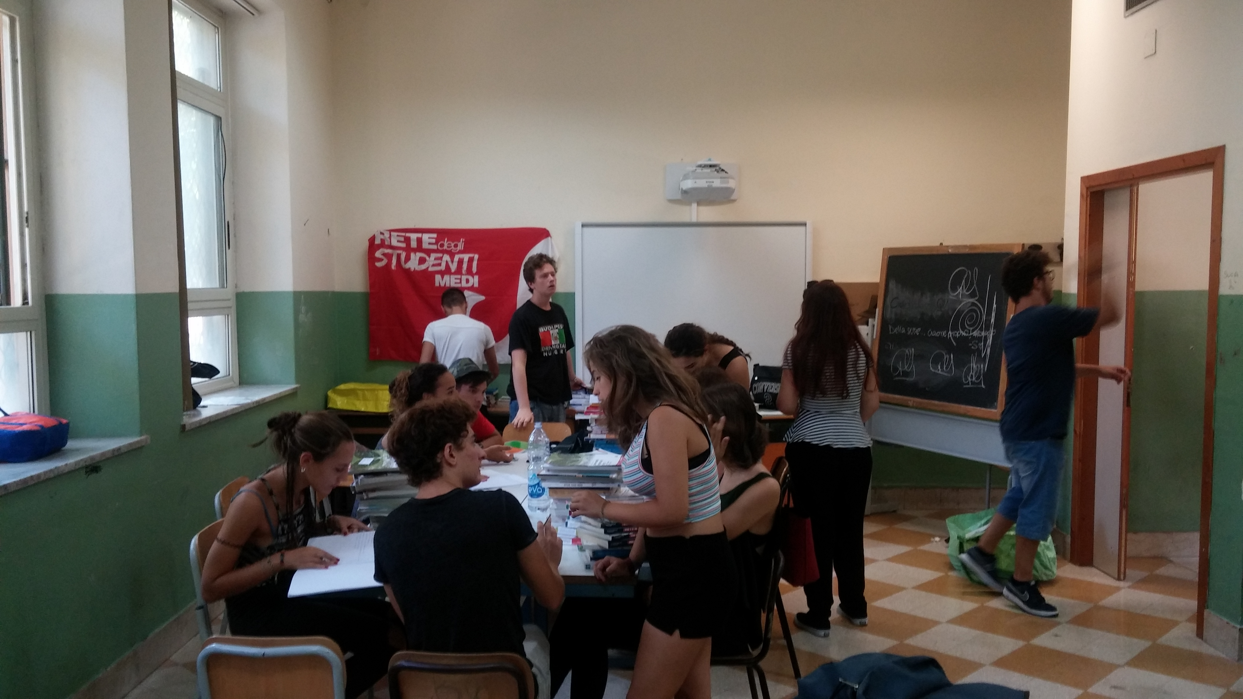 Mercatino del libro usato della Rete degli Studenti Medi a Palermo, Liceo Classico Umberto I.